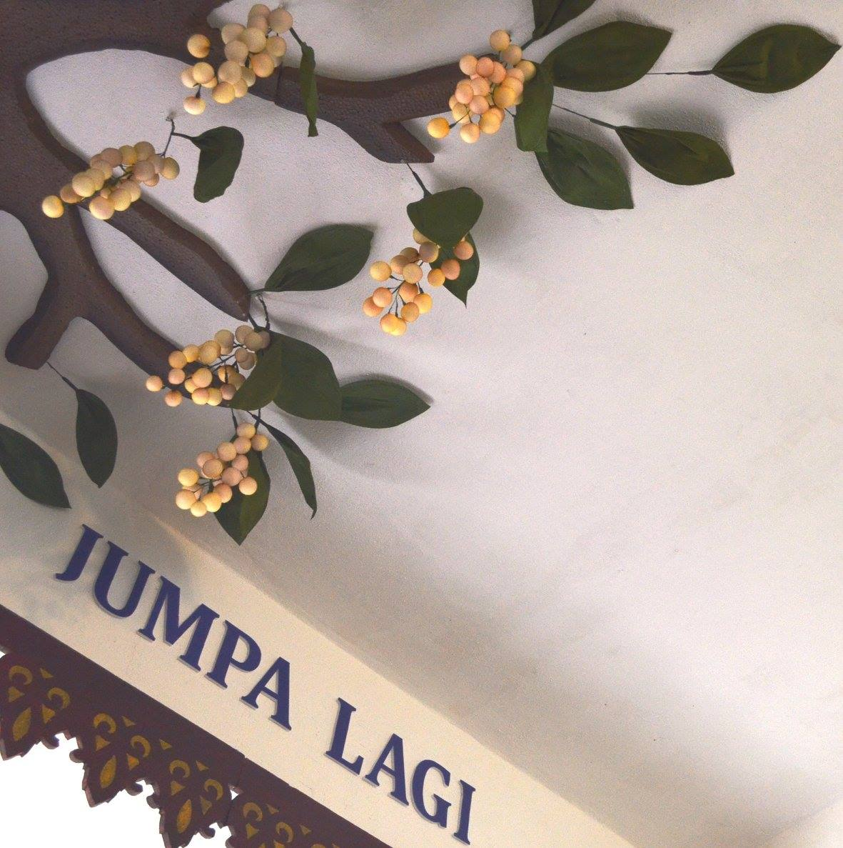 replika pokok